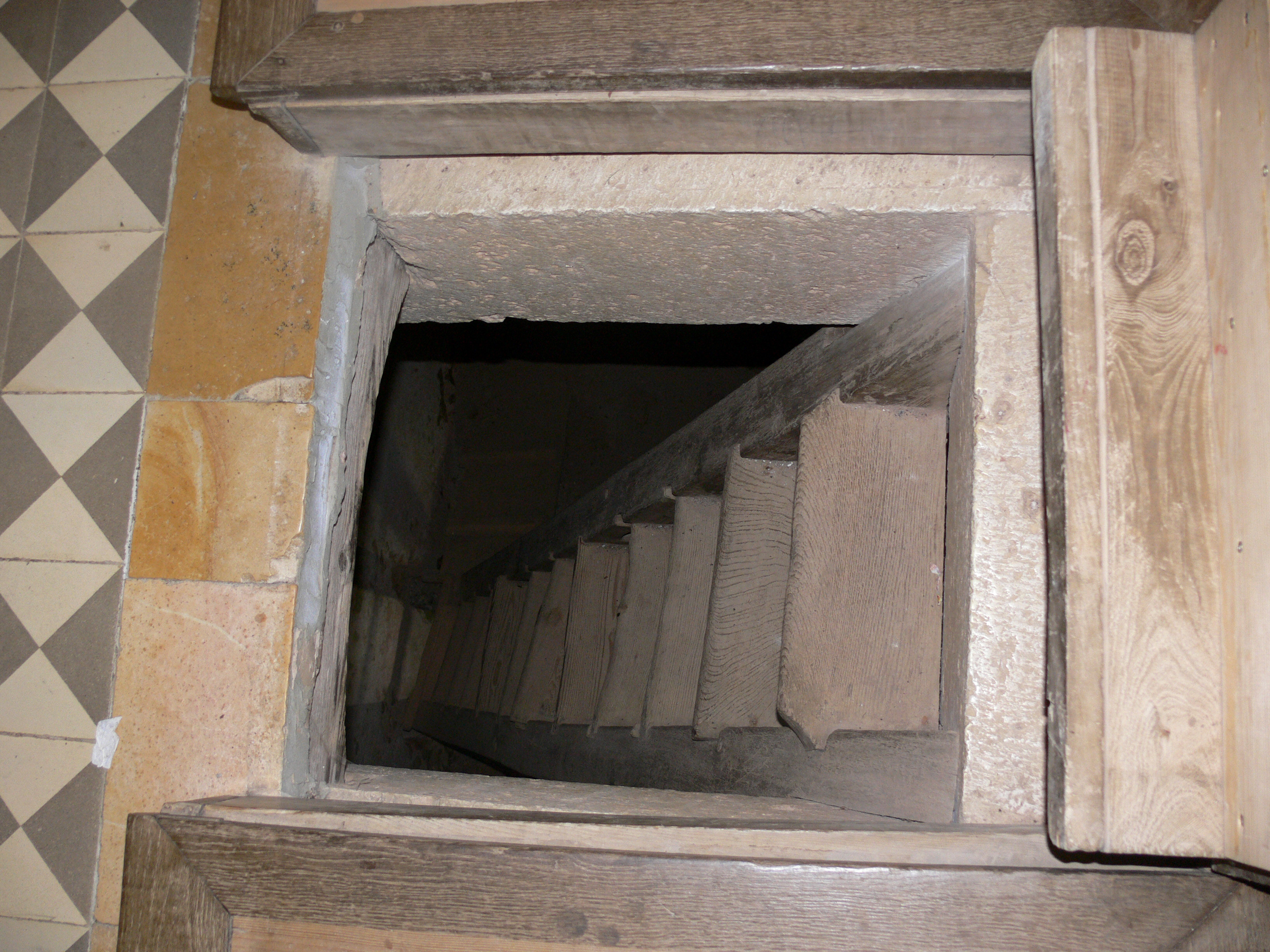 Burg Wildenstein bei Leibertingen Burgkapelle, Geheimgang vom Altar in einen Raum unter der Kapelle